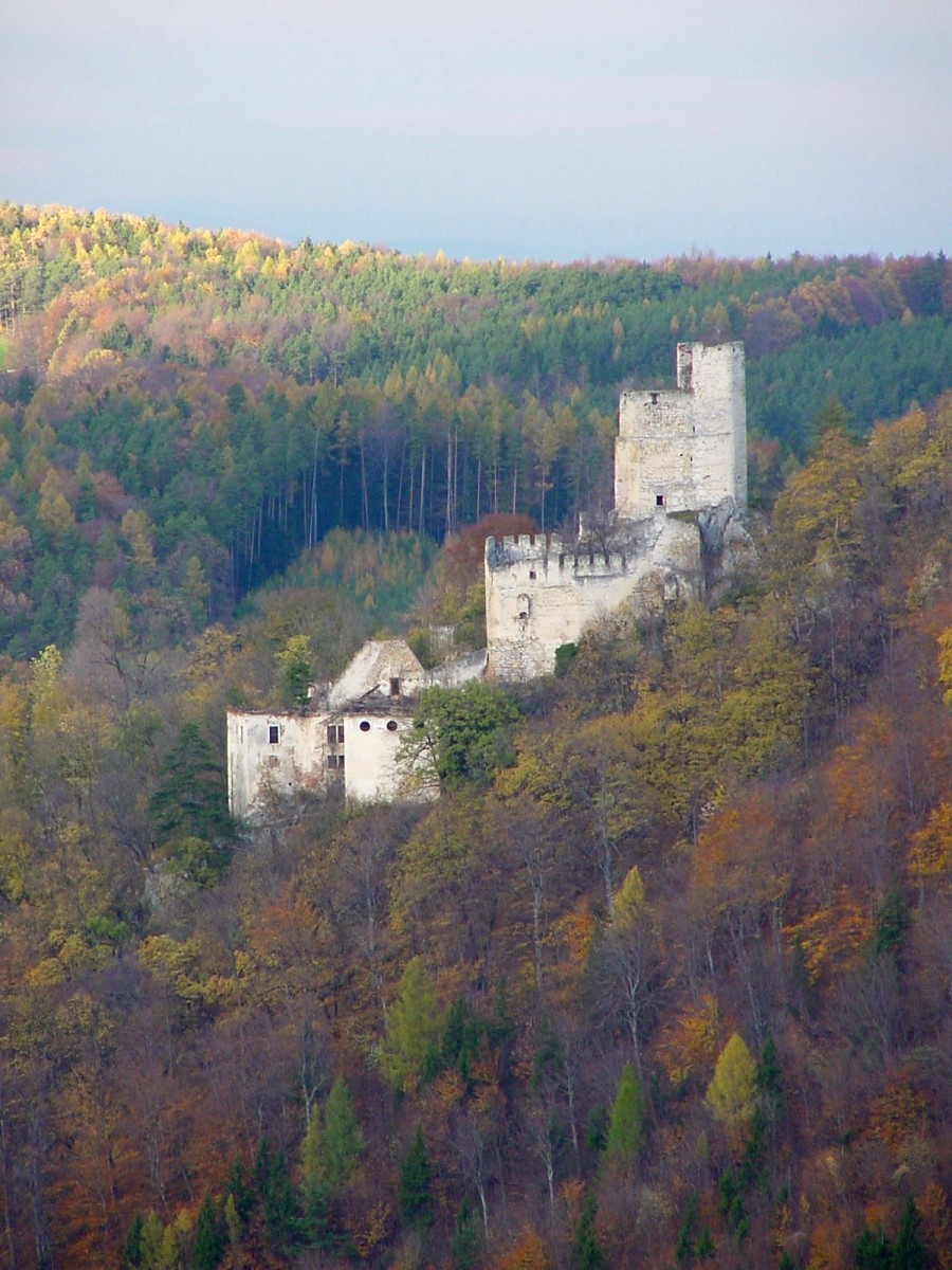 Thernberg Burg (Gemeinde Scheiblingkirchen).jpg